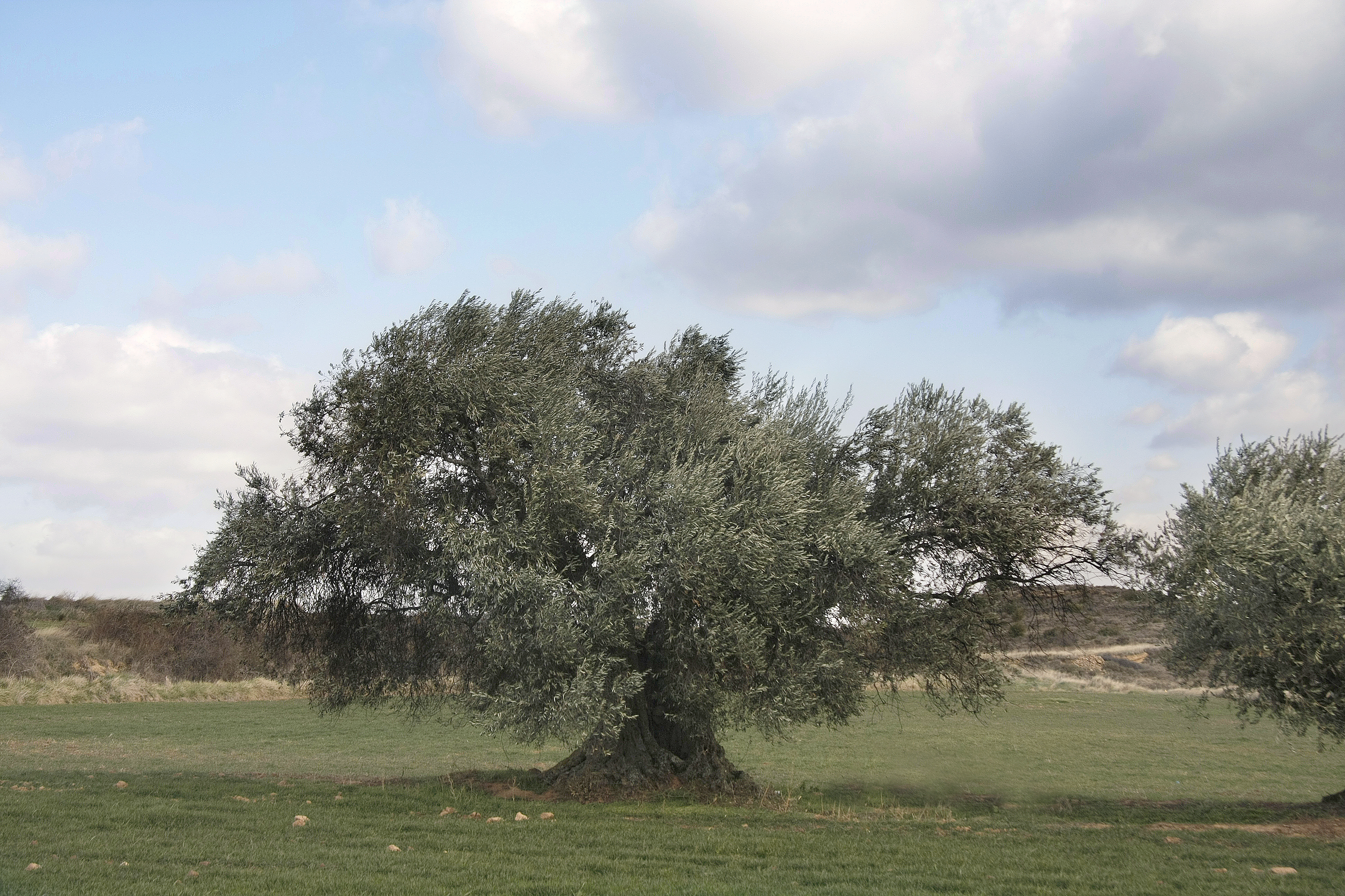 Olivo de Daniel, uno de los árboles singulares de la comunidad autónoma de La Rioja, situado en la localidad de Sojuela. Tiene 550 años y mide 6m de altura y 8 de perímetro. Unknown daniel's olive, one of the singular trees of the spanish authonomy of la rioja, in sojuela village. it´s 550 years old and it's 6 meters high.